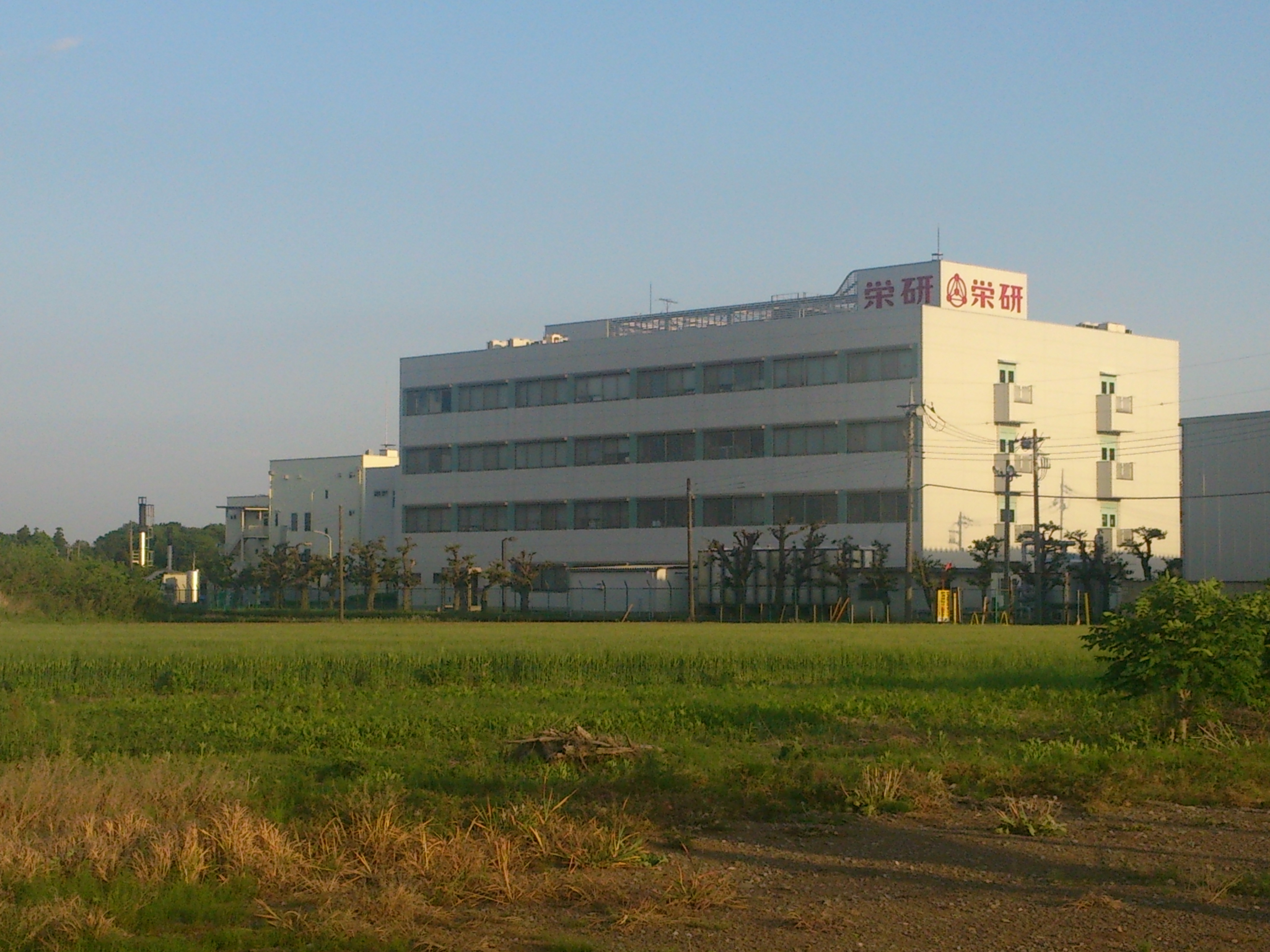 栄研化学株式会社生物化学研究所（栃木県野木町）